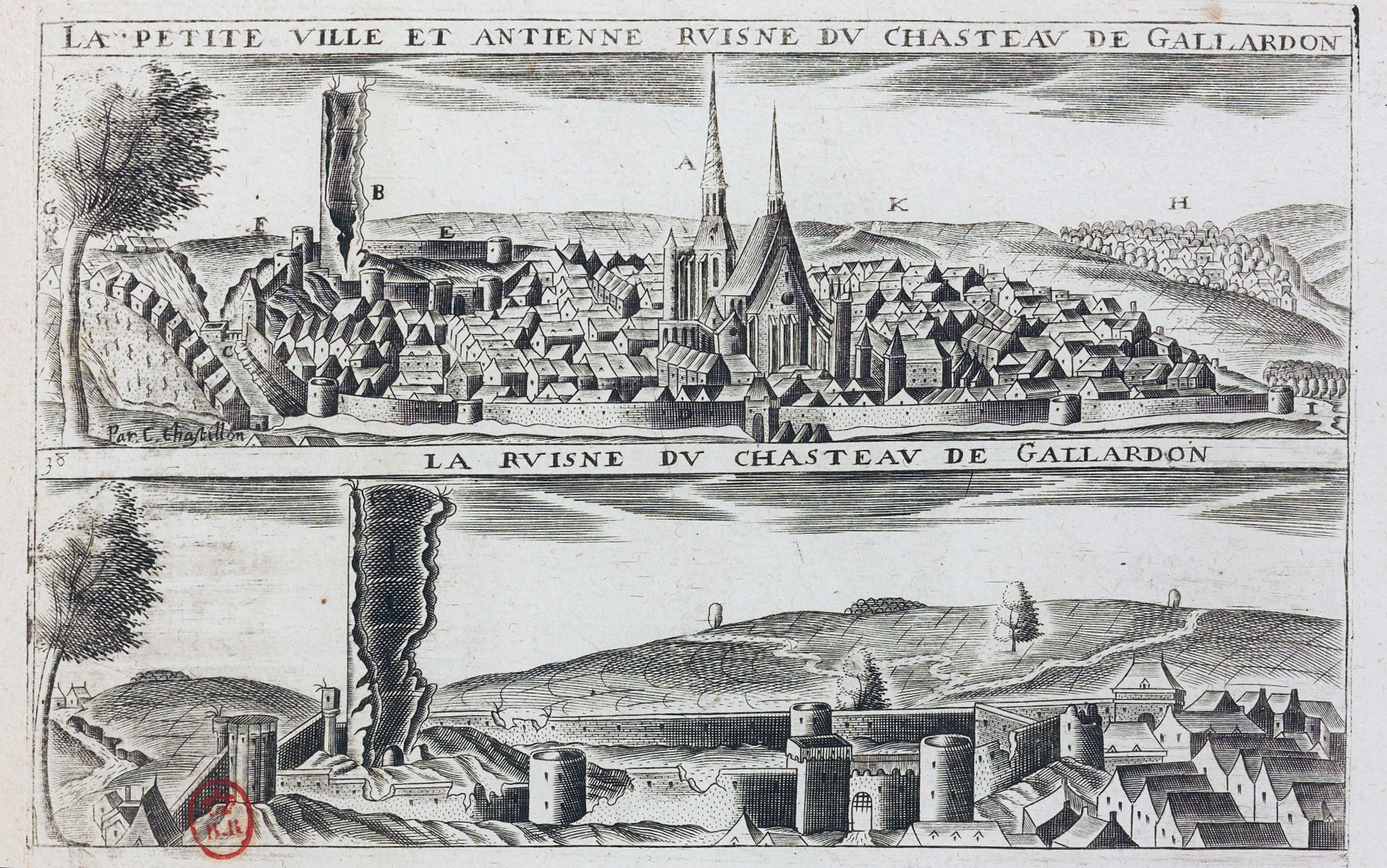 Gravures de Claude Chastillon, représentant la ville et les ruines du château de Gallardon (Eure-et-Loir)